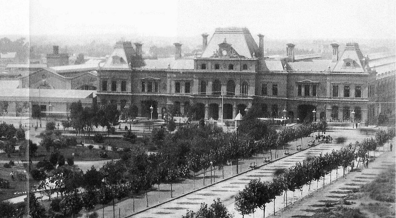 La Estación Plaza Constitución del Ferrocarril del Sud. Edificio conocido como Constitución II, existente entre 1885 y 1898. Avenida (hoy Lima Oeste) circulada de a caballos y en carros. Barrio de Constitución, Buenos Aires, Argentina.